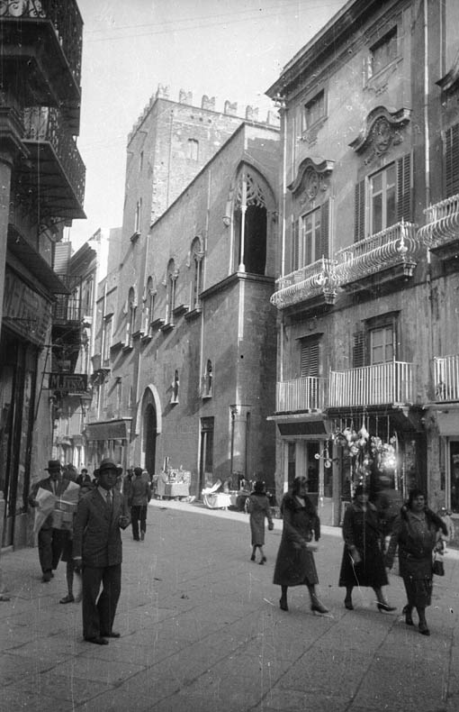 Sicilien. Motiv: Palermo Kategori: StadsmiljöSicilien.